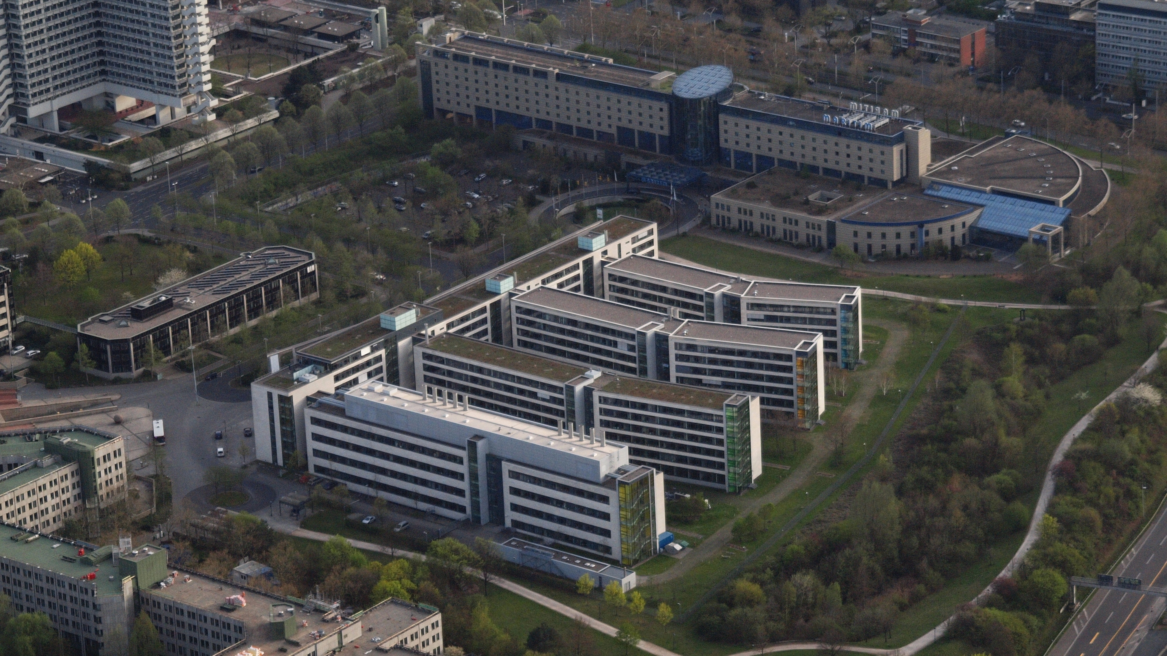 Bundesinstitut für Arzneimittel u. Medizinprodukte, Robert-Schuman-Platz, Bonn-Hochkreuz: Luftaufnahme